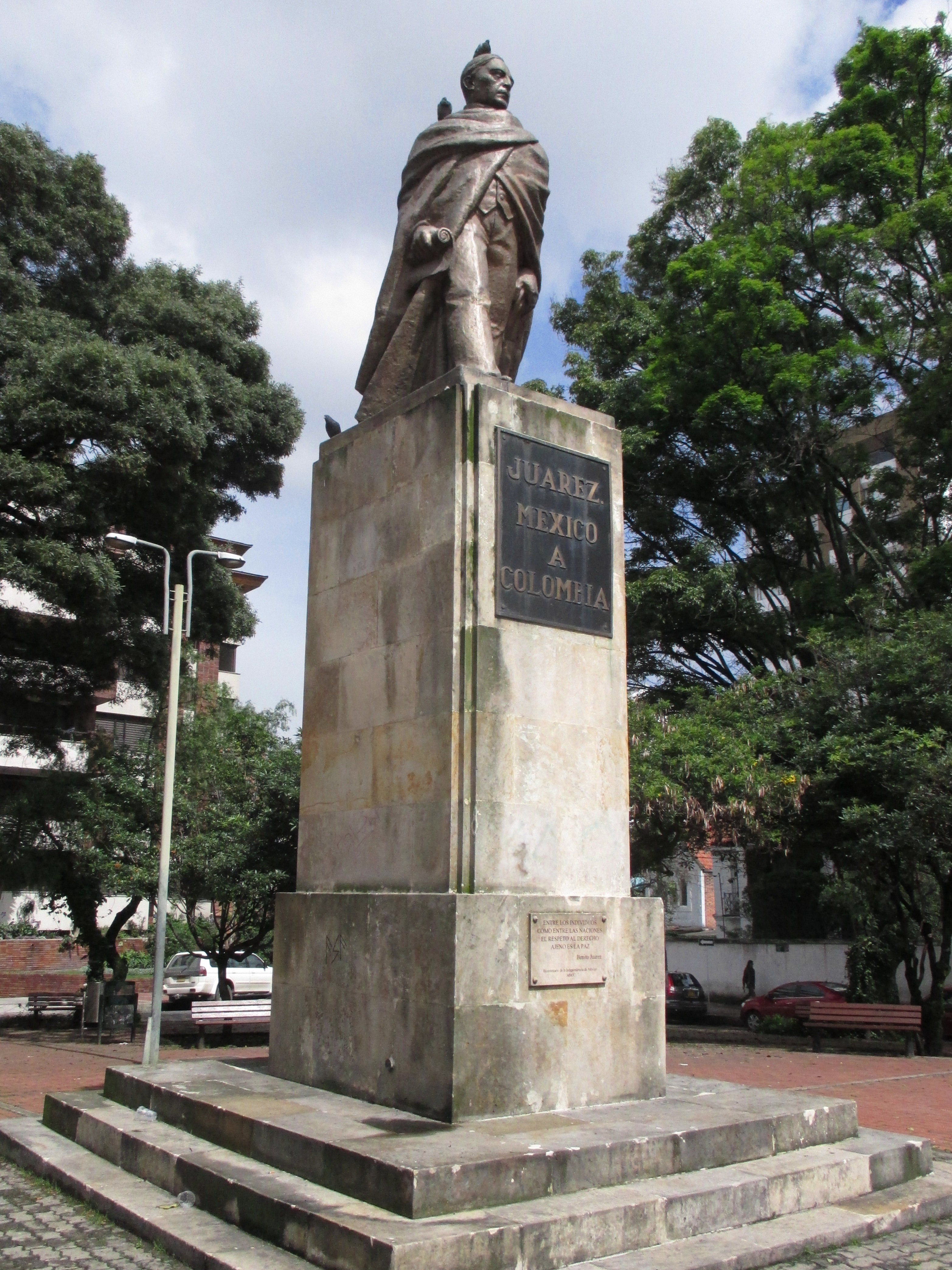 Benito Juarez, estatua en Bogota